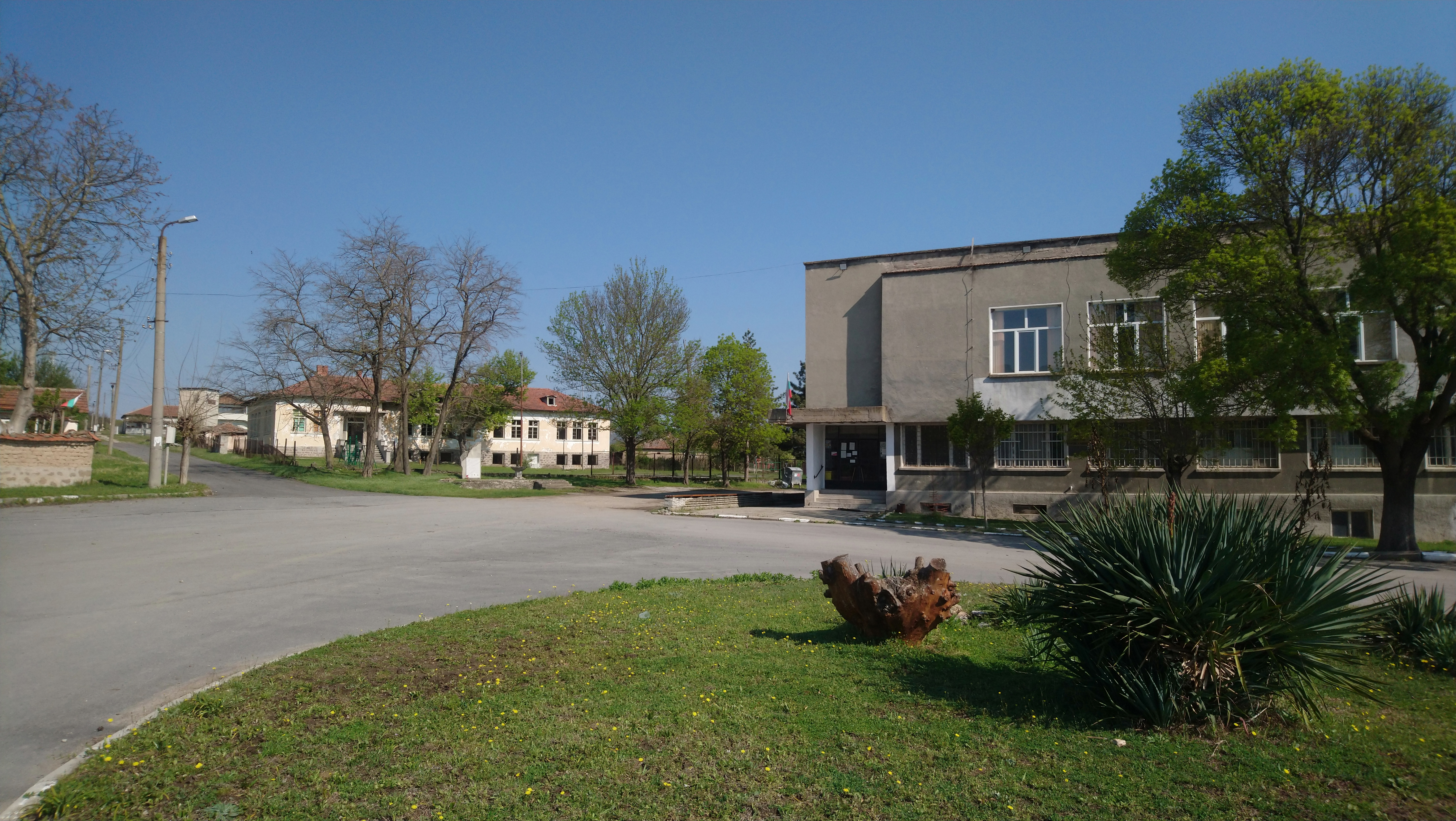 Центърът на село Бориславци